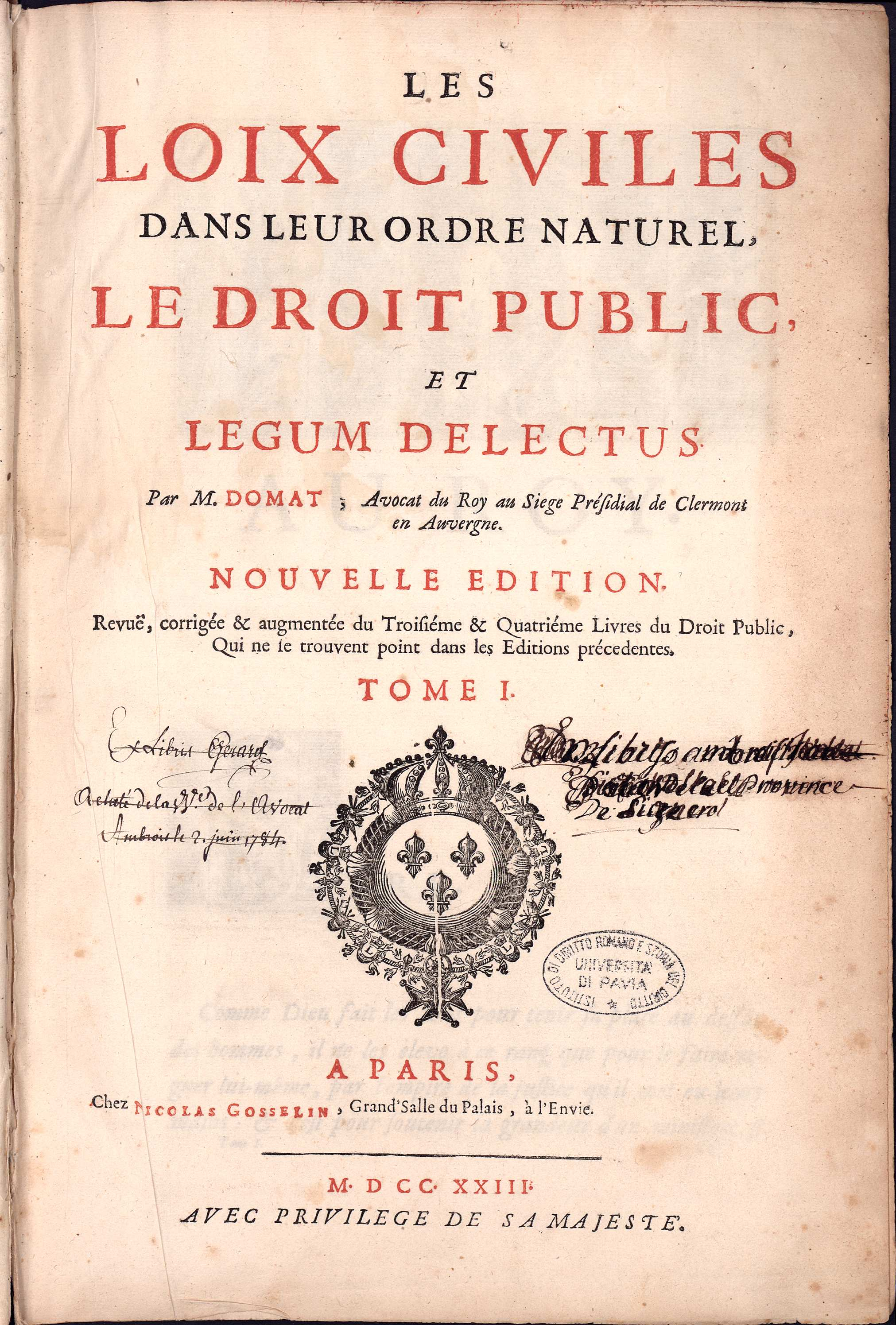 Frontespizio